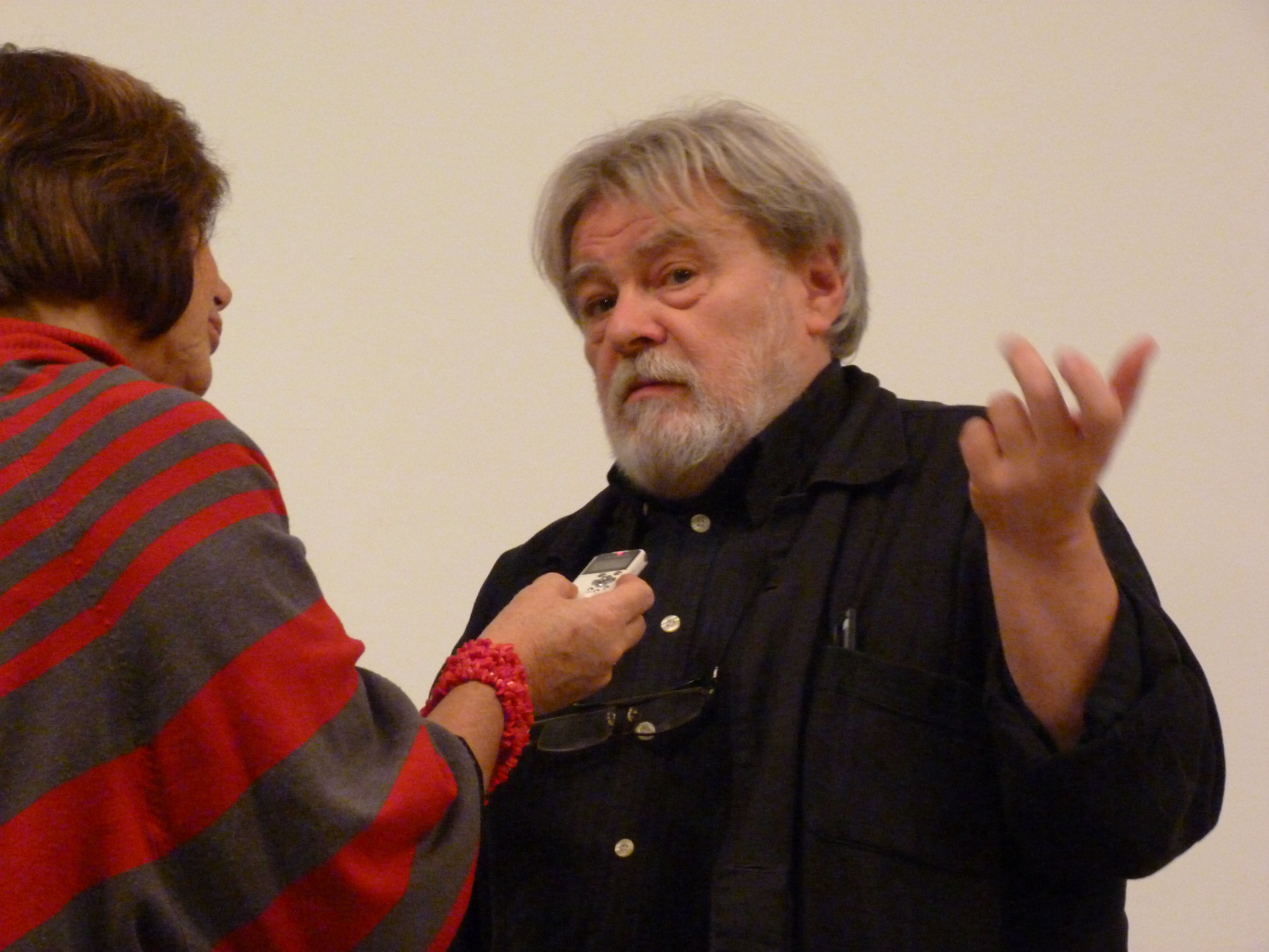 Parti Nagy Lajos. A felvétel 2011. november 28 –án hétfőn készült Budapesten, az OSA Archivum Budapest, Arany János u. 32 szám alatti épületében. Az Eötvös Károly Intézet a Rendszerkritikai Esték keretében “Az elveszejtett Alkotmány” címmel tartott “rendszerkritikai” kerekasztal-beszélgetést. A beszélgetésen részt vettek: Elek István közíró, Erős Ferenc társadalompszihológus, Majtényi László alkotmányjogász, Szabó Máté és Parti Nagy Lajos író. Zenélt: Dés László, felolvasott: Parti Nagy Lajos. . A felvétel megjelent Creative Commons alatt a Metapolisz DVD sorozatban.